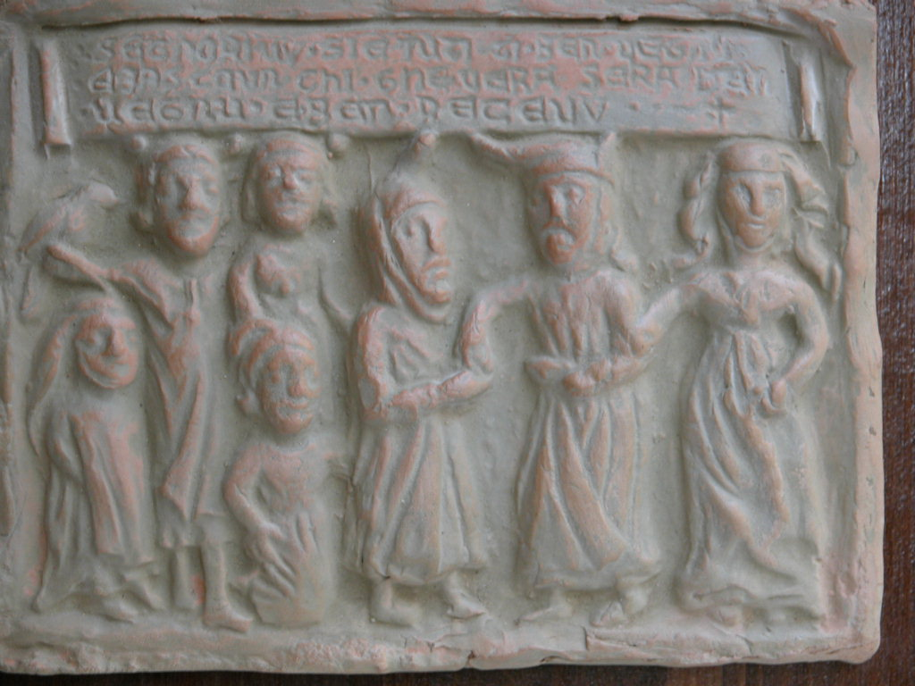 Foto mia personale, riproduzione del Benvegnù del castello di Montechiaro PC, 2008